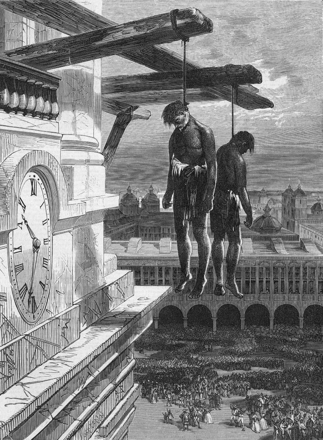 Революция в Перу. Братья Гутьеррес, повешенные на колокольне собора в Лиме.